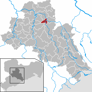 Niederstriegis in Saxony - district Mittelsachsen